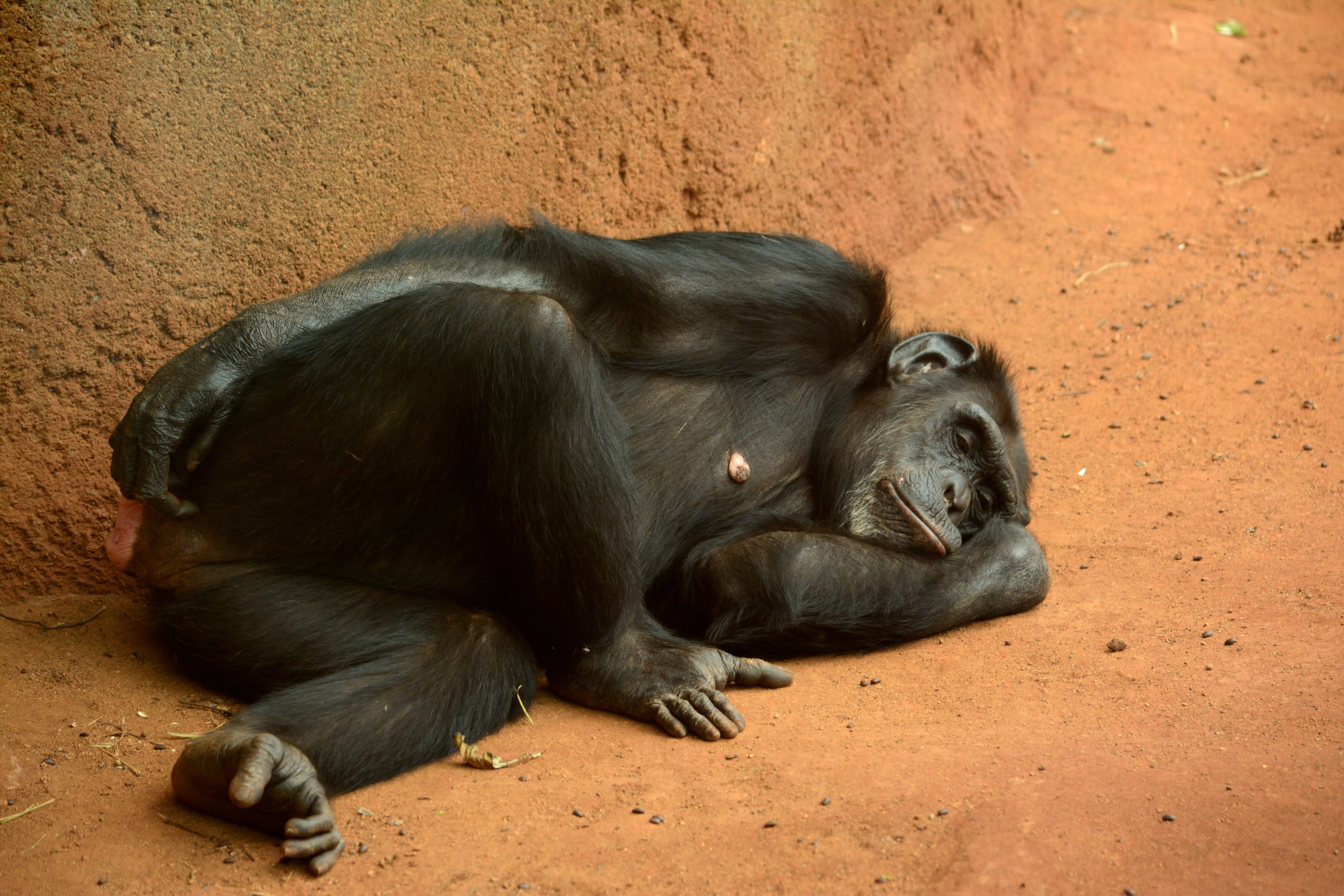 Sleeping chimpanzee